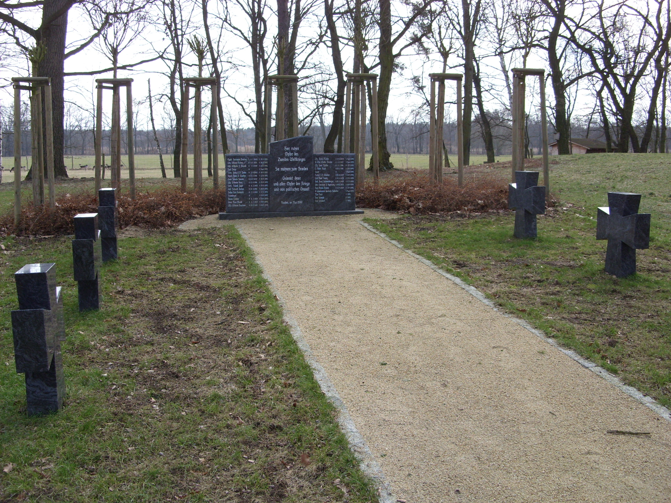 Denkmal für die Gefallenen des Zweiten Weltkrieges in Rauden, Gemeinde Boxberg, Landkreis Görlitz. Hornjoserbsce: Pomnik za wopory druheje swětoweje wójny w Rudeju, gmejna Hamor, wokrjes Zhorjelc.